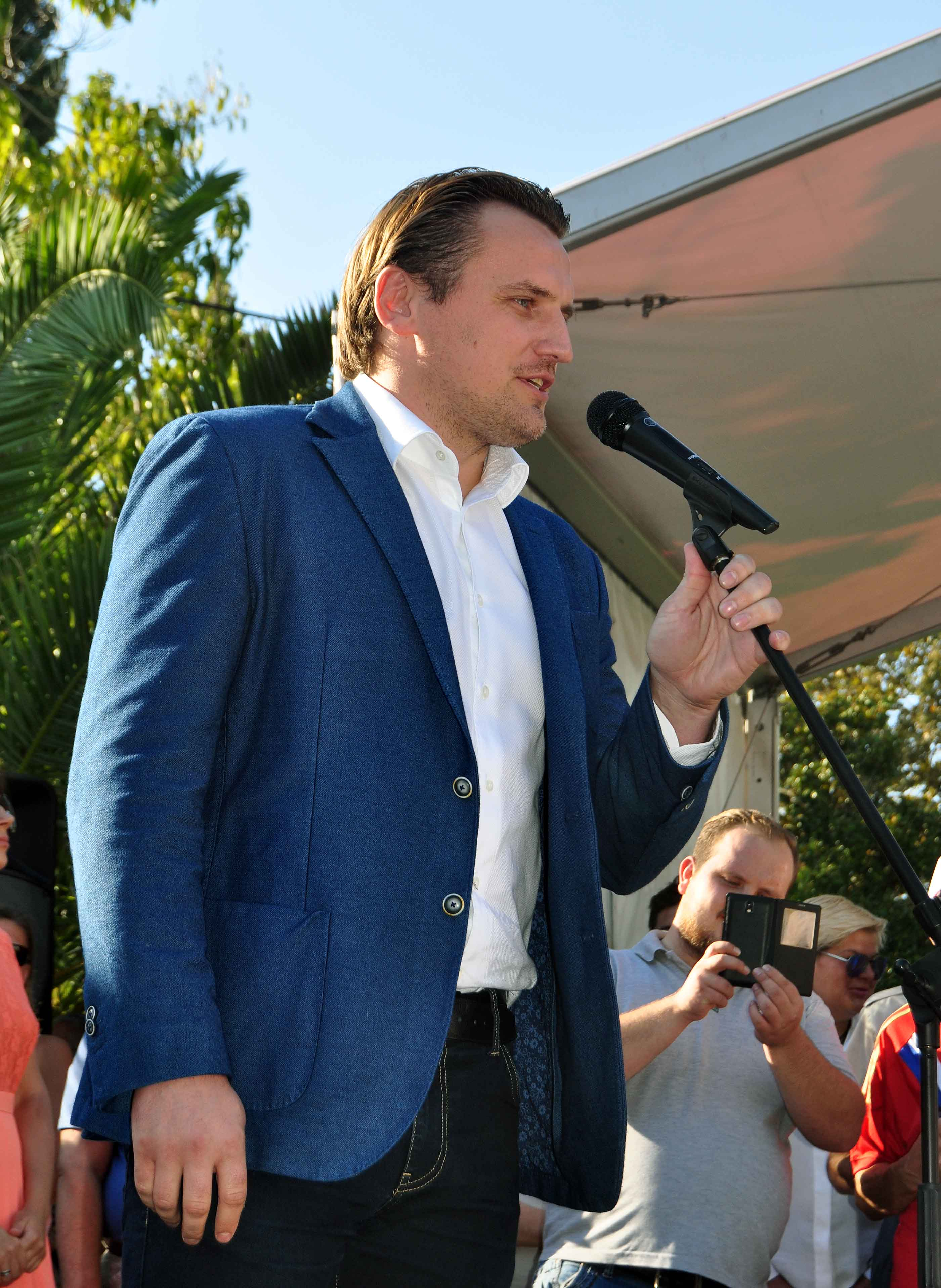 церемония по запуску часов обратного отсчета до чемпионата мира по футболу 2018 в Сочи